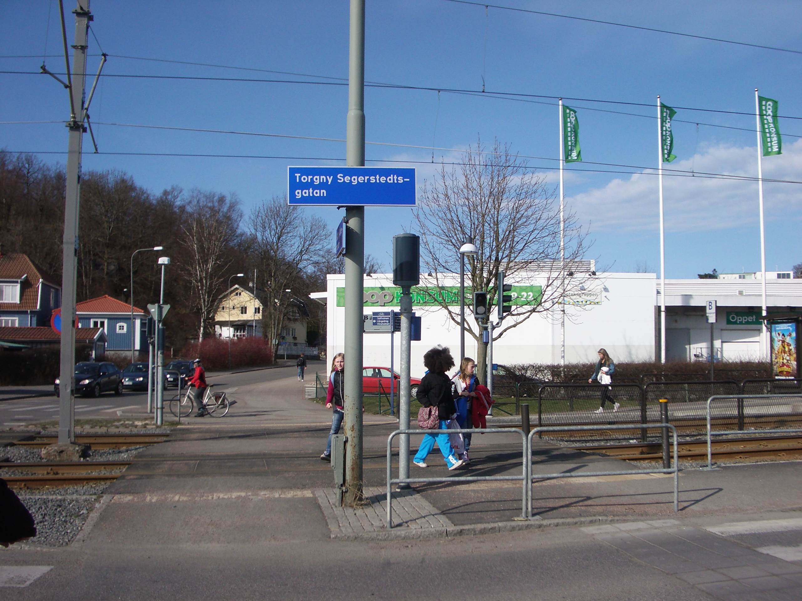 I västra Göteborg sträcker sig Torgny Segerstedtsgatan 2,4 km i sydvästlig riktning mot Saltholmen och havet. Här nära hållplatsen för spårvagnar vid Ängkärrsvägen.